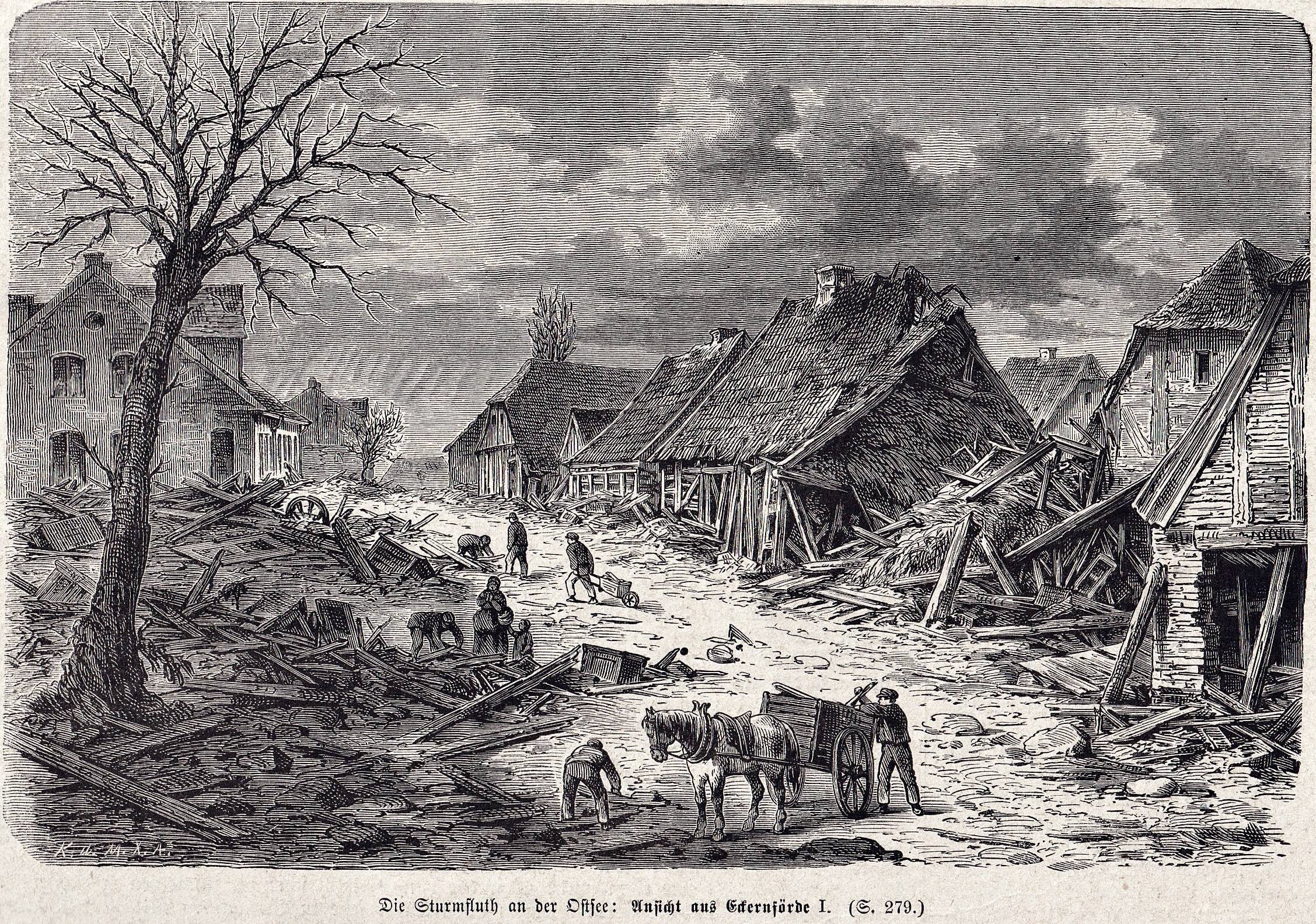 Ostsee-Sturmflut 1872, Eckernförde